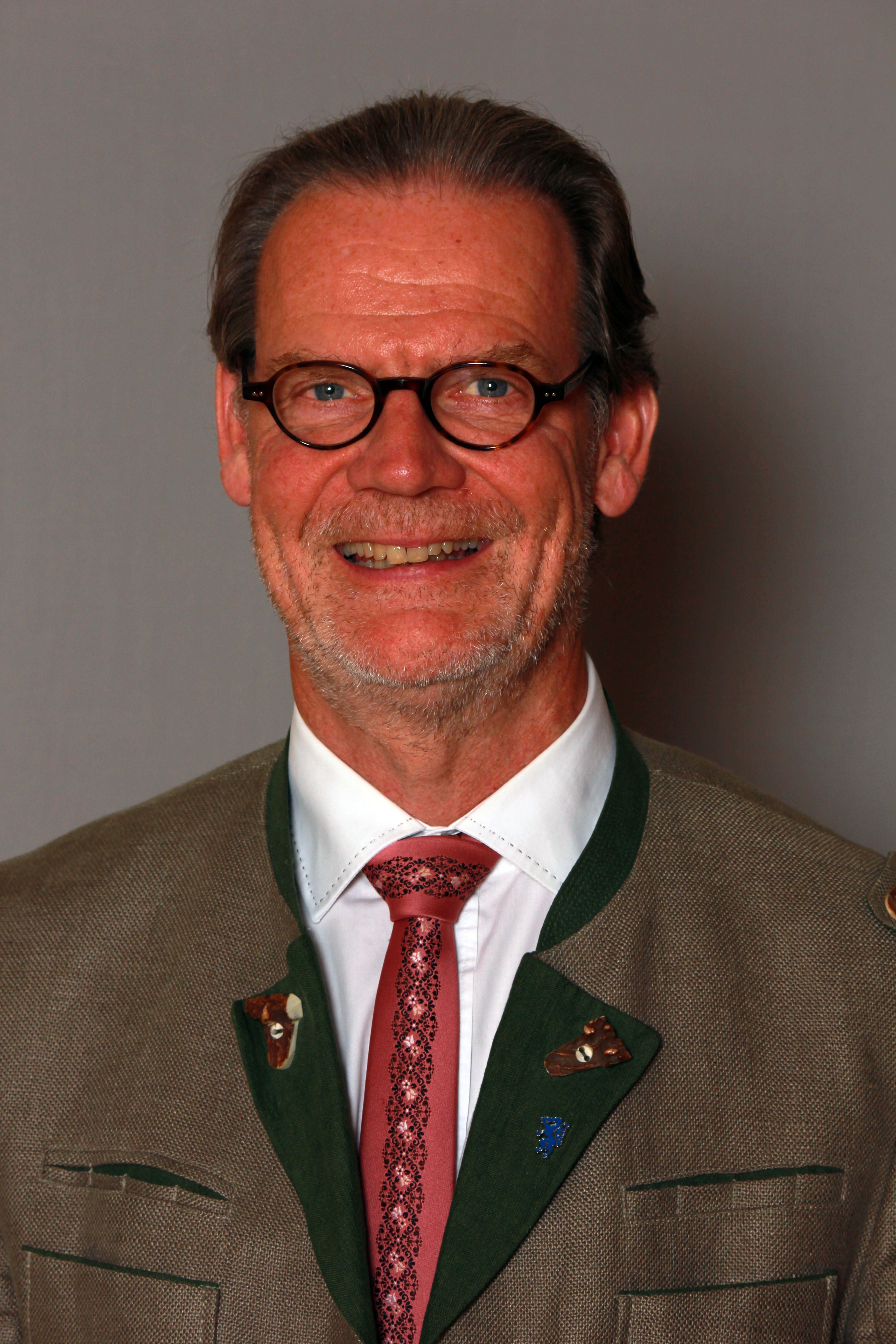 Gerald Deutschmann, Abgeordneter zum steiermärkischen Landtag